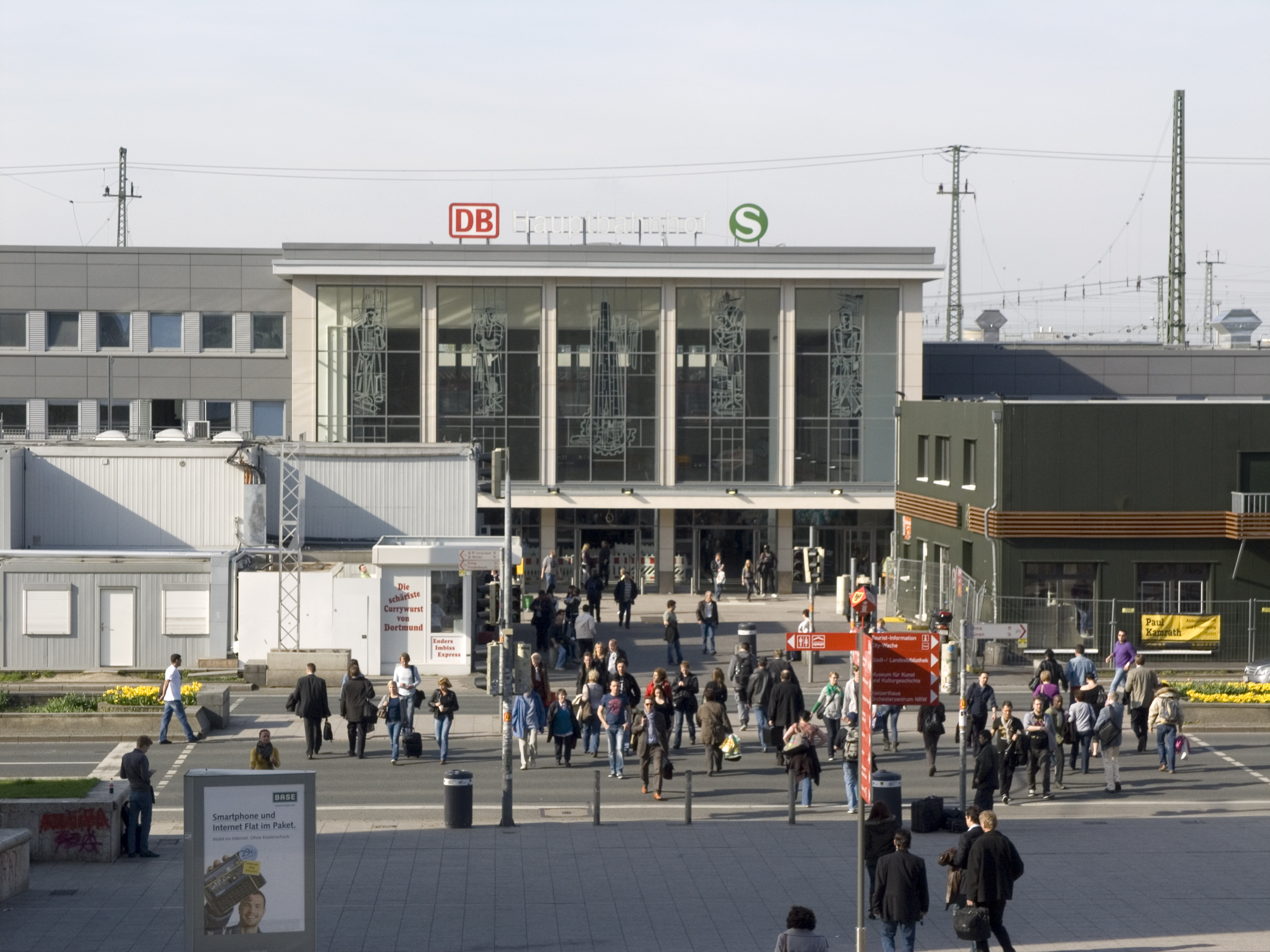 Северный Рейн-Вестфалия, Дортмунд - железнодорожный вокзал